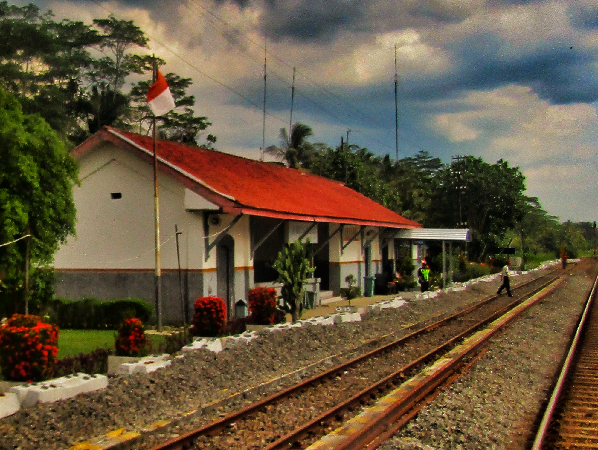 Bangunan utama Stasiun Meluwung, 2020